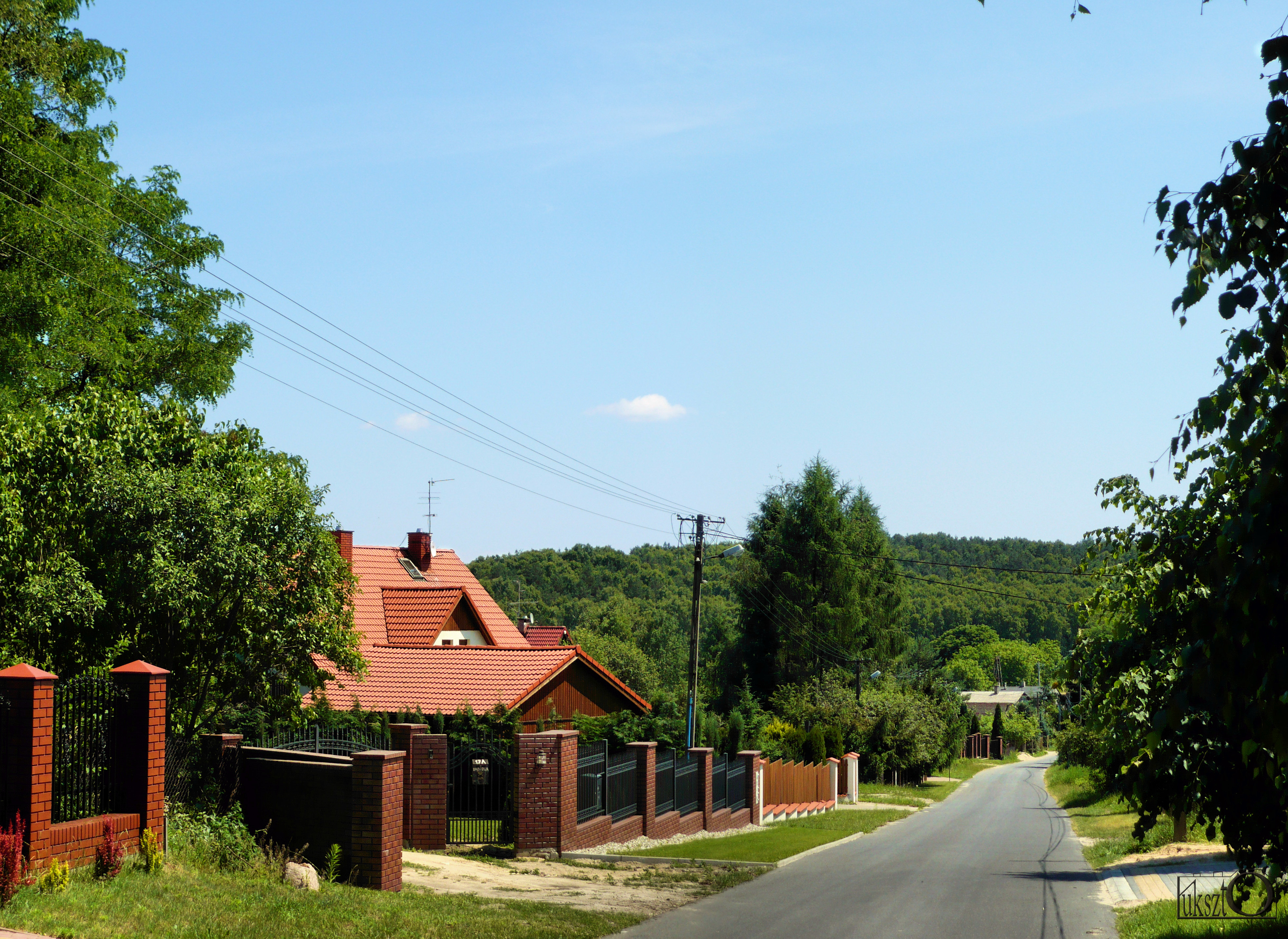 Park Krajobrazowy Wzniesień Łódzkich , Kopanka-Dąbrowa